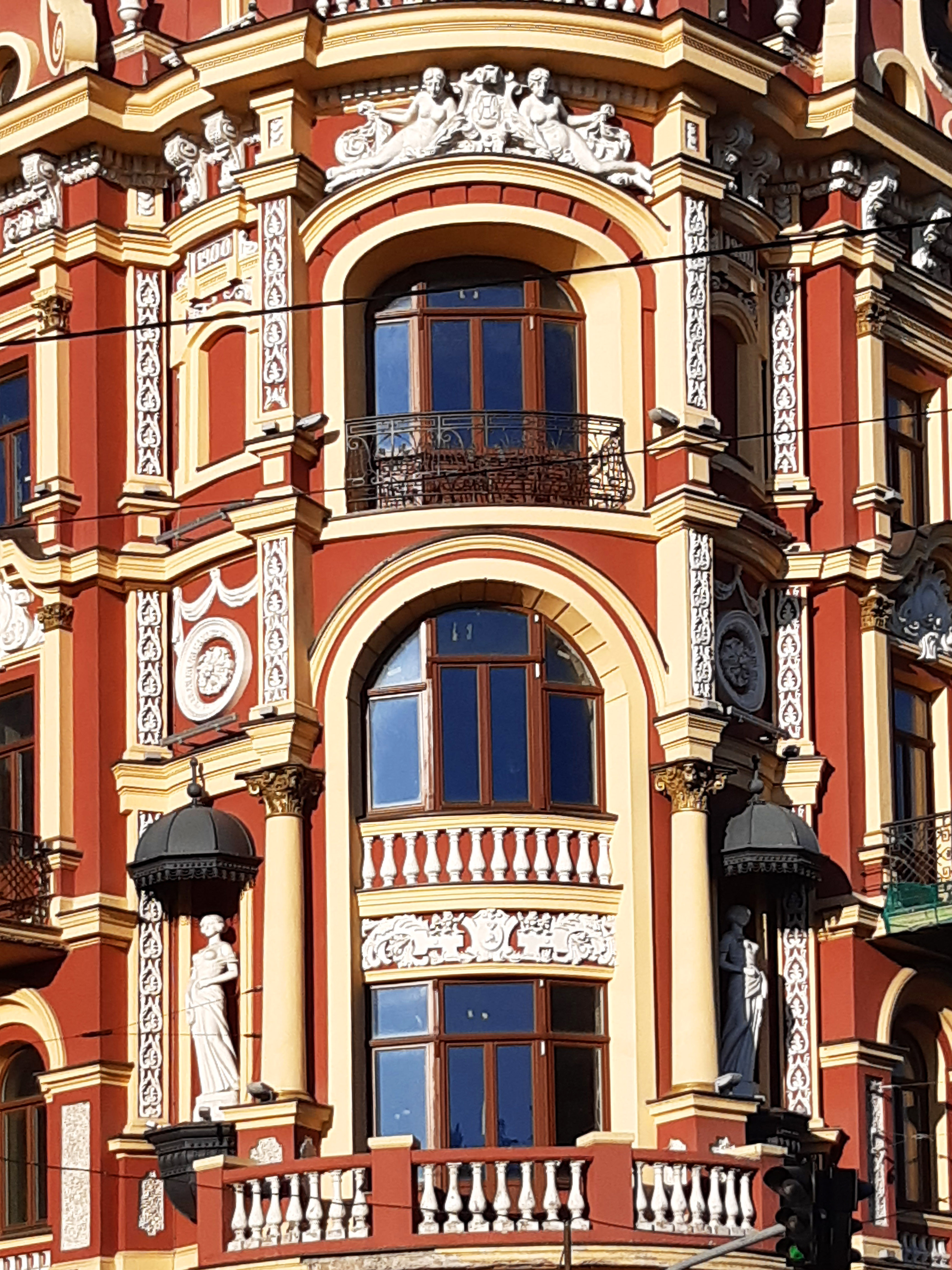 Будинок прибутковий, Київ, Володимирська вул., 39/24